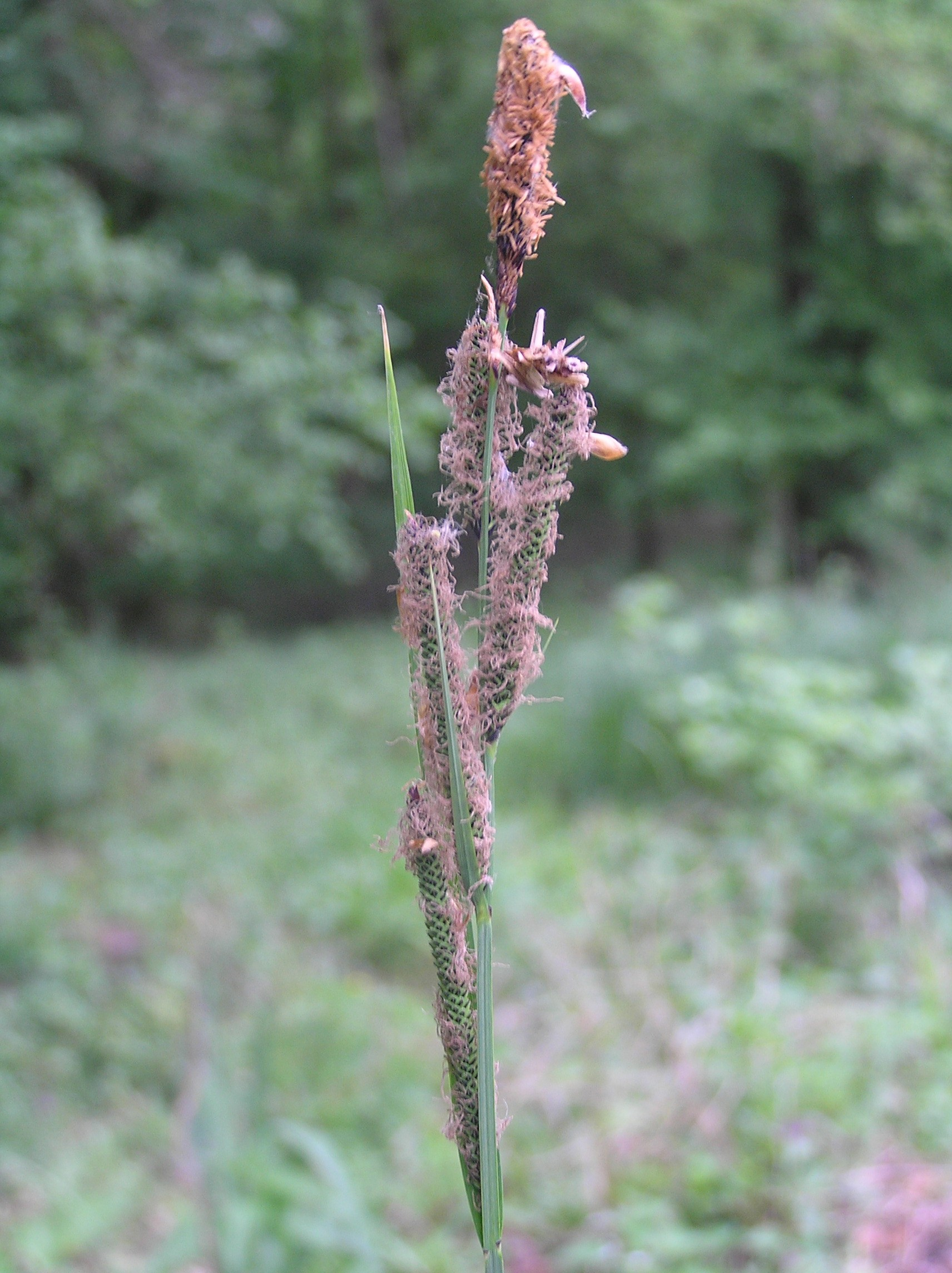 Carex buekii, Břeclav, Czech Republic